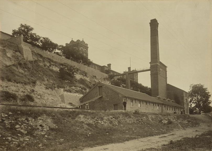 Първо българско анонимно привилегировано дружество за памучни прежди, фабрика „Княз Борис“ във Варна. Основано в 1899 г. с основен капитал 2 000 000 лева, с 300 работници. През 1912 г. е с основен капитал 2 000 000 лева и 249 работници. Фотоалбум с фотографии на български индустриални предприятия от периода 1887-1912 г., подарен от Съюза на българските индустриалци на цар Фердинанд І по случай 25-годишнината от възшествието му на българския престол.